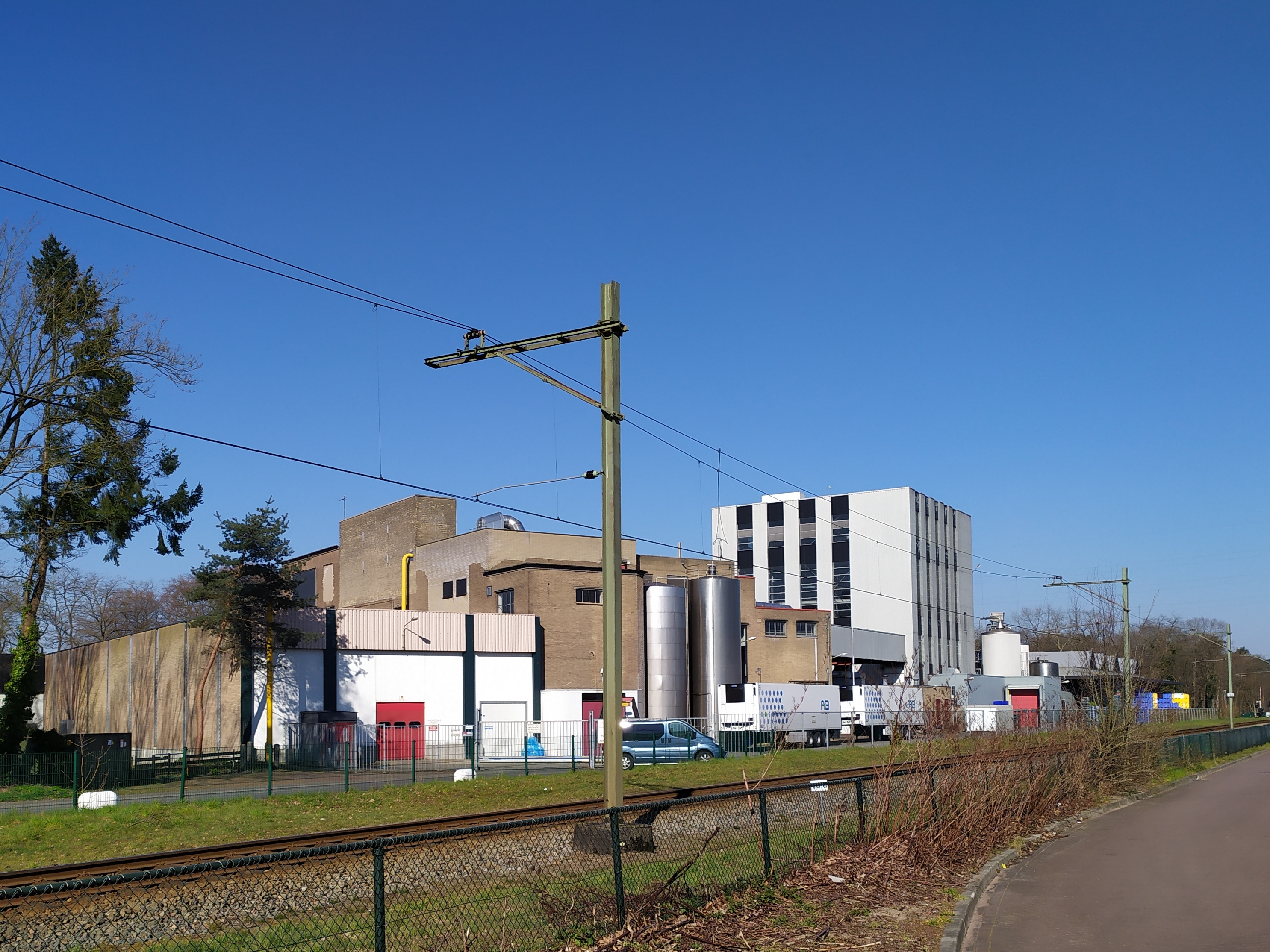 Vika Ede, voormalige zuivelfabriek